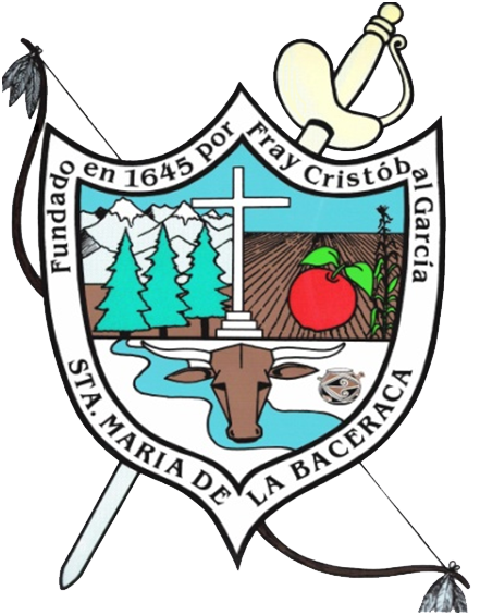 Escudo de Bacerac, Sonora, México.